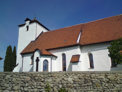 Katolícky kostol v Turanoch. Pohľad z juhu